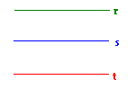 Feixe de Retas paralelas, feito por Guilherme A. de M. e S. Teixeira